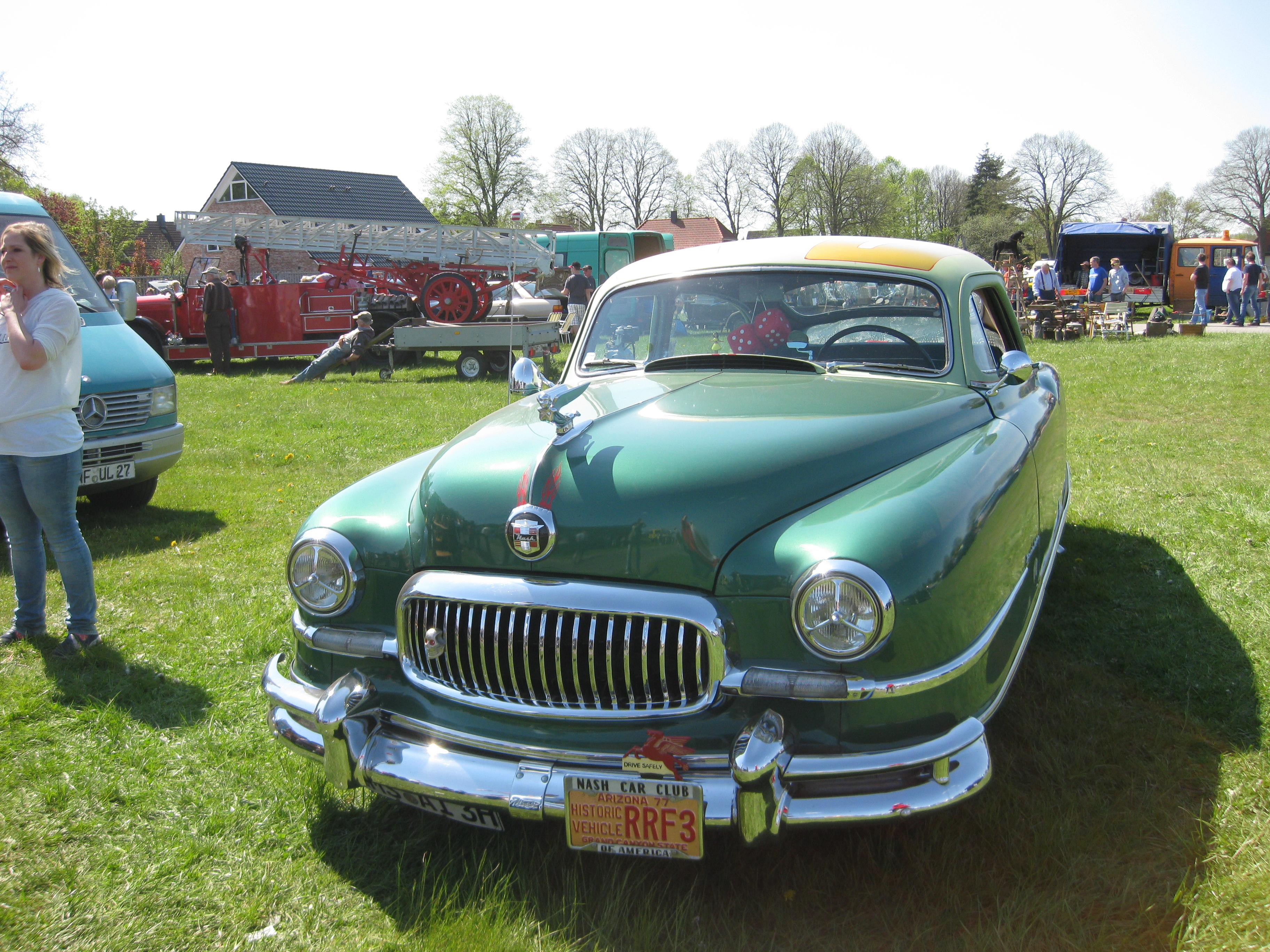 Nash Ambassador Airflyte Frontansicht